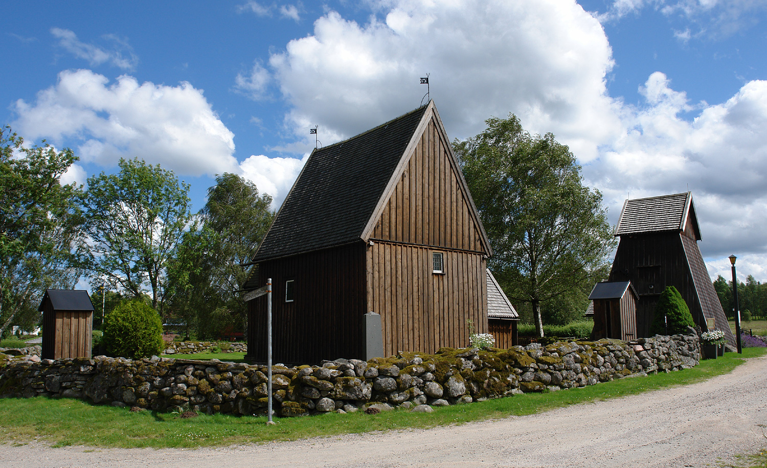 Die Stabkirche von Hedared (um 1500) ist die einzige erhaltene mittelalterliche Kirche dieser Bauart in Schweden.